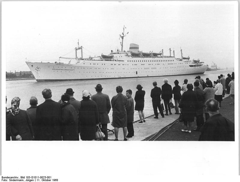 Zentralbild Sindermann-11.10.1968 Rostock: "Völkerfreundschaft" steuert mit Erntekapitänen Kurs Leningrad. Am 10.10.68 stach das Passagierschiff von Warnemünde zu einer 14-tägigen Reise in See. Die Erntekapitäne, Mähdrescherkollektive, Mitarbeiter von Getreidekombinaten und Mitarbeiter bäuerlicher Handelsgenossenschaften werden gemeinsam mit ihren Ehefrauen während der Reise auch Gdansk, Tallin und Riga kennenlernen. Unser Foto zeigt das Schiff beim Ablegen.